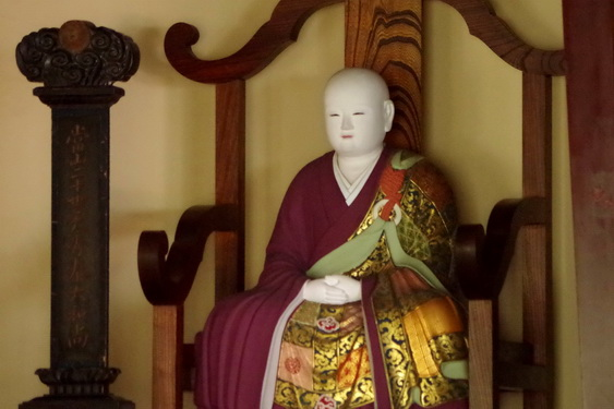 二十世天秀法泰